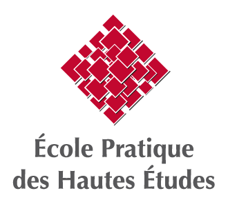 Logo Ecole pratique des hautes études